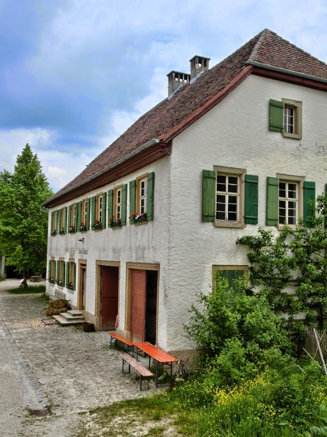 Deutschland - Baden-Württemberg - Landkreis Tuttlingen - Neuhausen ob Eck: Freilichtmuseum - Schul- und Rathaus